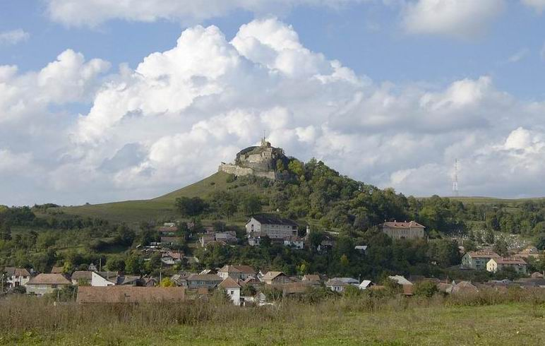 Rupea in Romania